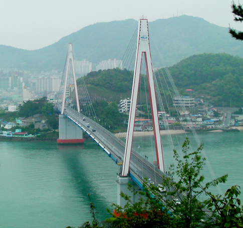 돌산대교 (Dolsan Bridge)